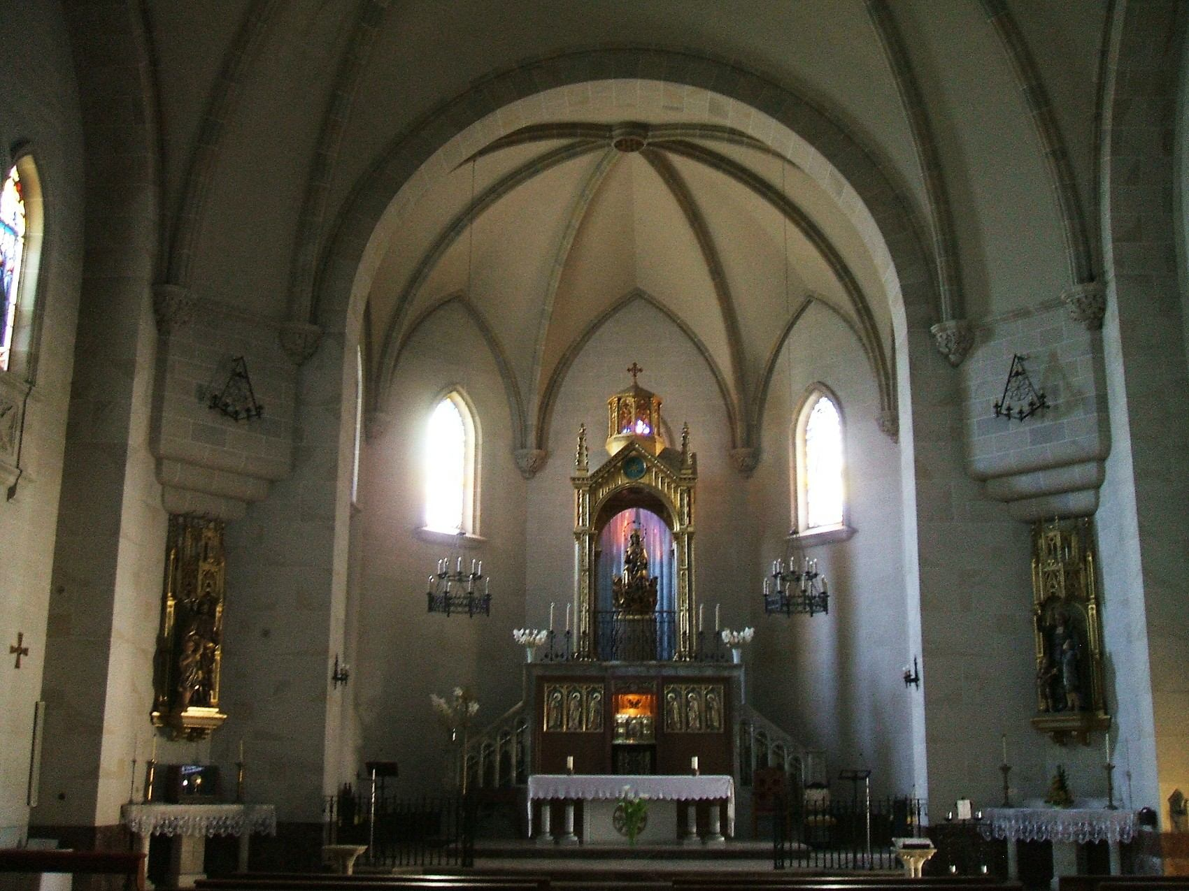 Cabecera de la iglesia del Monasterio de Santa María de la Estrella, San Asensio, La Rioja, España